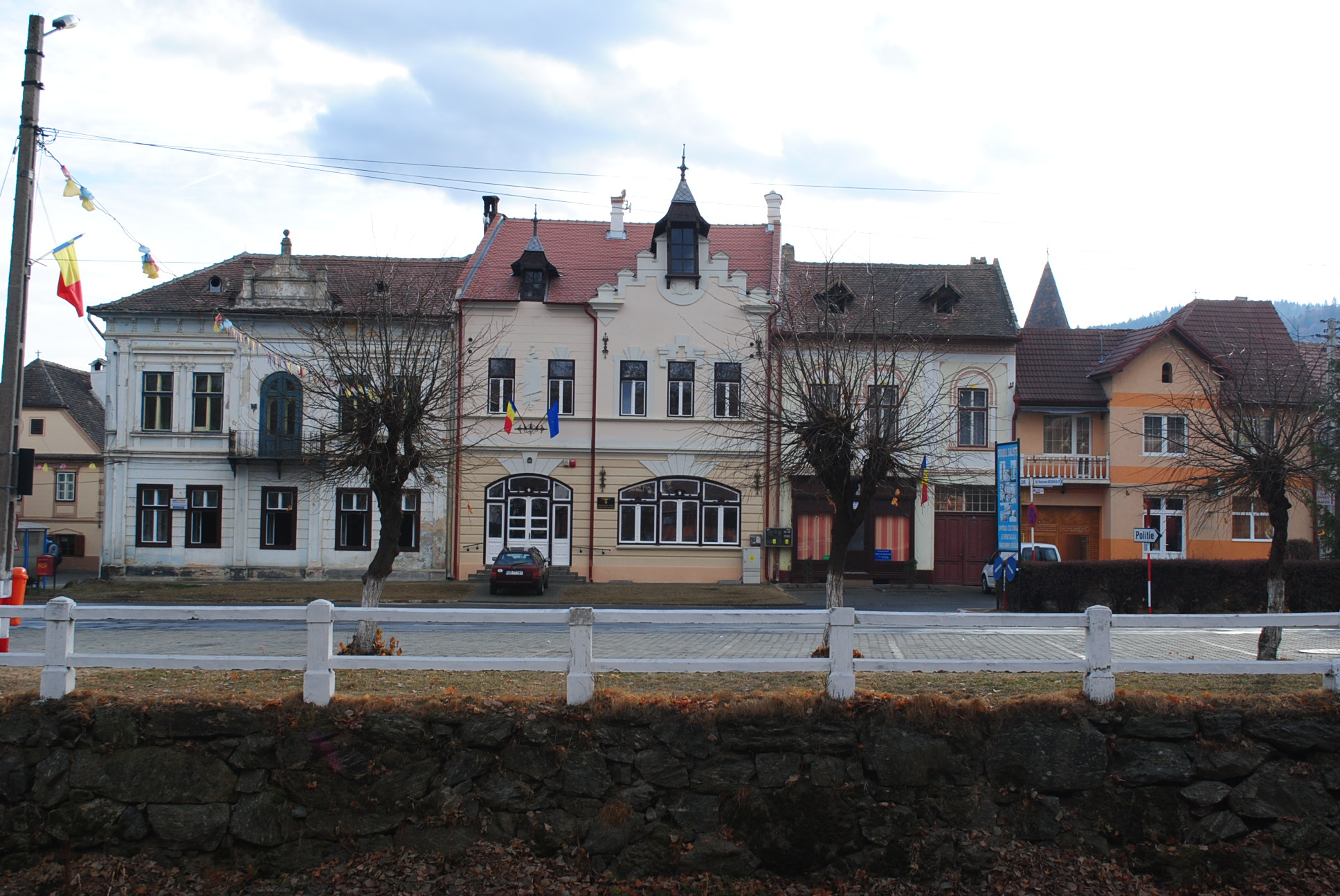 Ansamblul rural "Centrul istoric" sec. XVIII - XIX